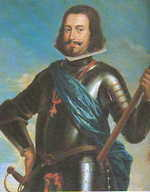 Johann IV. von Portugal